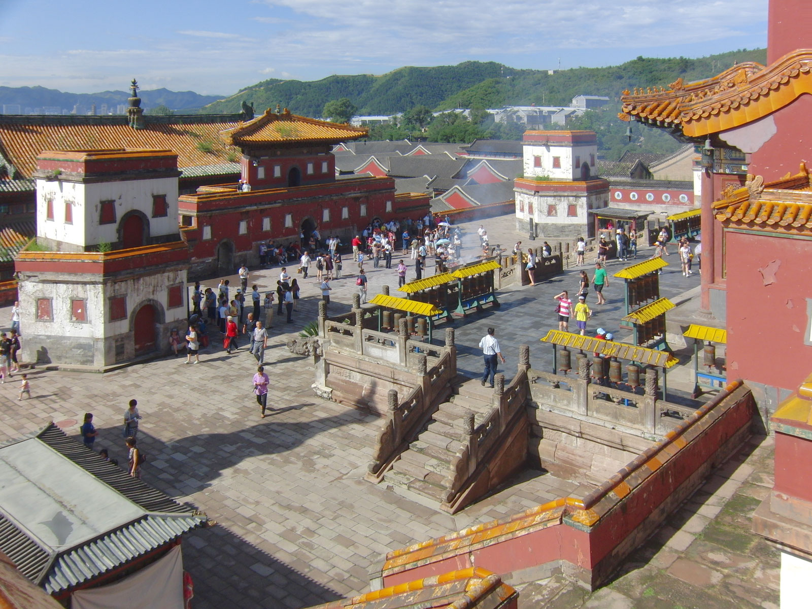 Площадь перед входом в зал Махаяны в храме Пунинсы (Храм Вселенского спокойствия 普宁寺 Puning Temple).